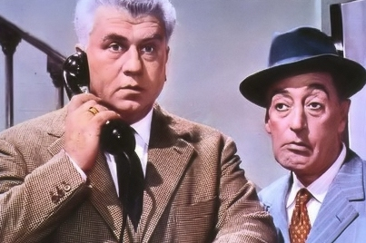 Totò nelle immagini dei suoi film